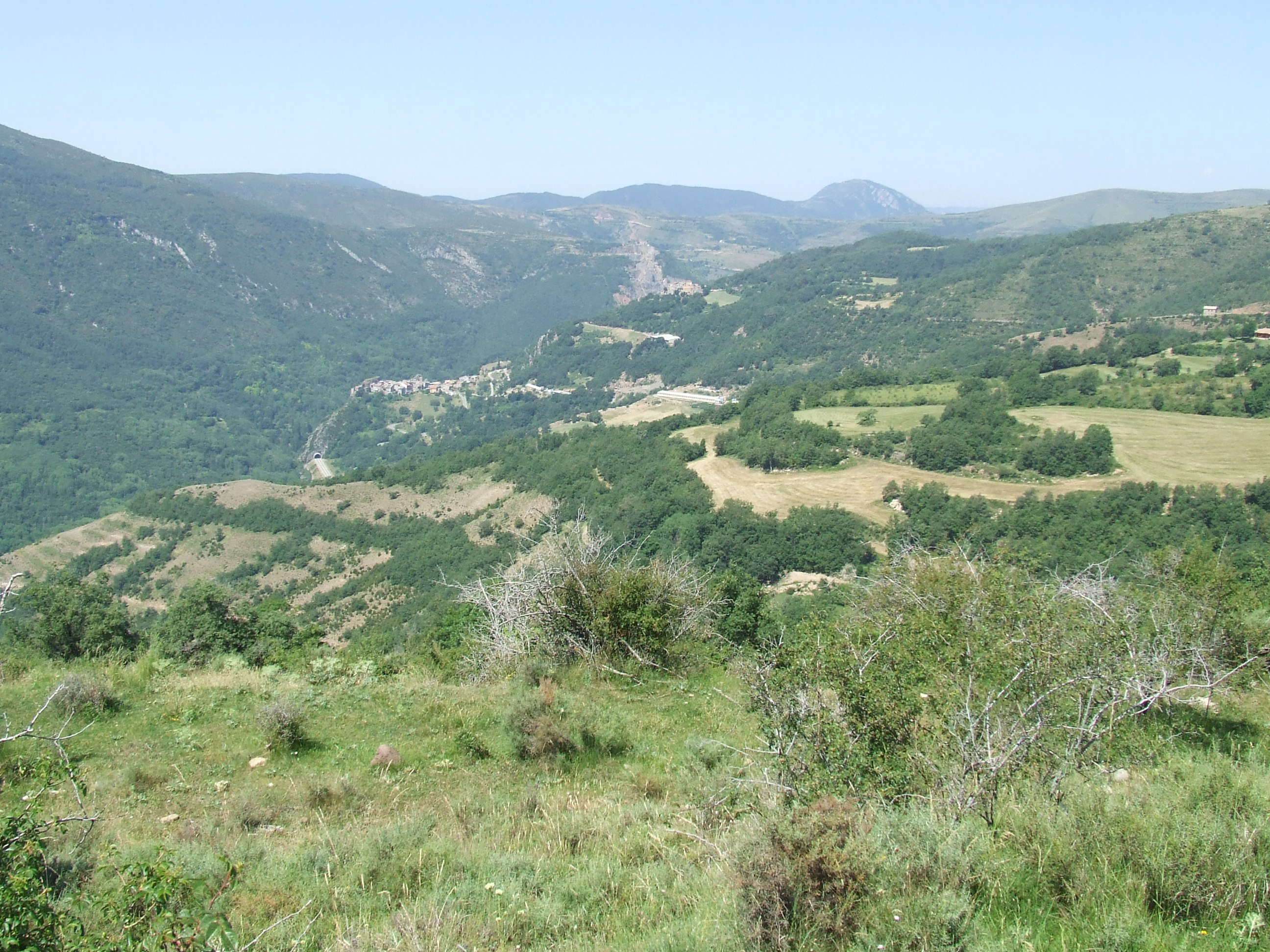 La vall alta del riu Bòssia, a Sarroca de Bellera (Pallars Jussà)